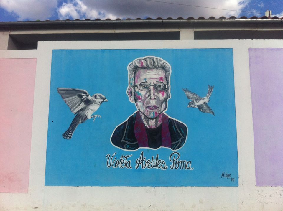 Grafiti de Violeta Ardiles Poma en la calle Prolongación Simón Bolívar, Huaraz, región Áncash.